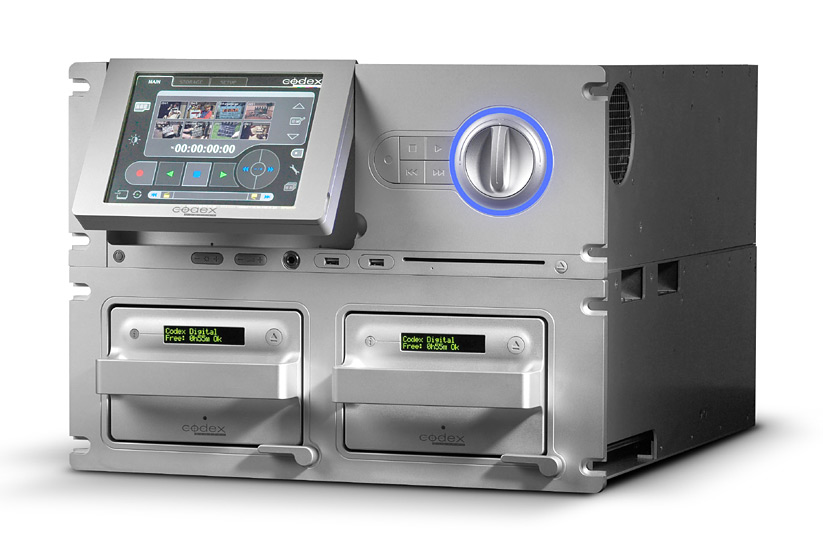 Codex Studio Recorder